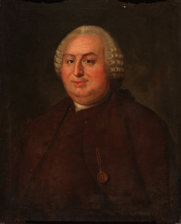 Porträtt av åldermannen i Bryggareämbetet Olof Ström (1702-1764), på bröstet syns Serafimermedaljen. Porträtt av okänd från ca 1750.